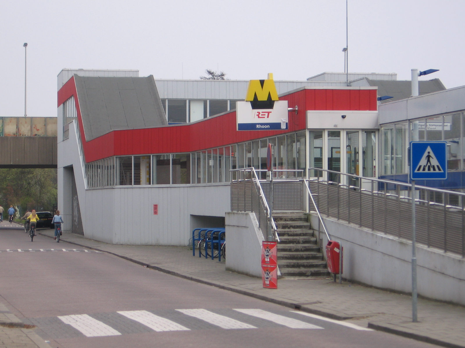 Rhoon, Albrandswaard, 23 april 2006